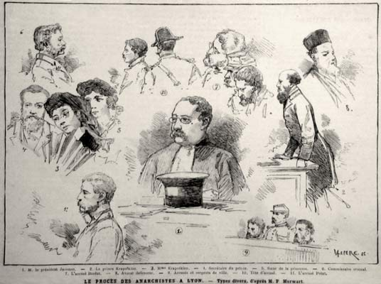 Le Procès des 66, impliquant 66 militants anarchistes, est une affaire politique jugée devant le tribunal correctionnel de Lyon le 8 janvier 1883.